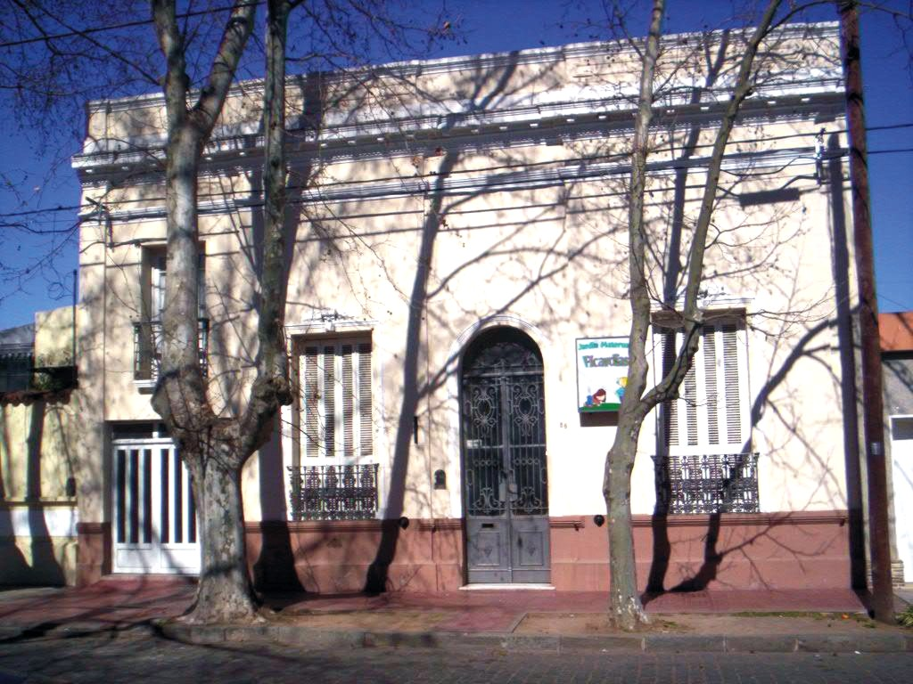 Casa ubicada en la calle Roque Vázquez 86, en Junín, Buenos Aires, Argentina. Aquí vivió Eva Perón entre 1930 y 1932. Fotografía tomada a principios de 2006.